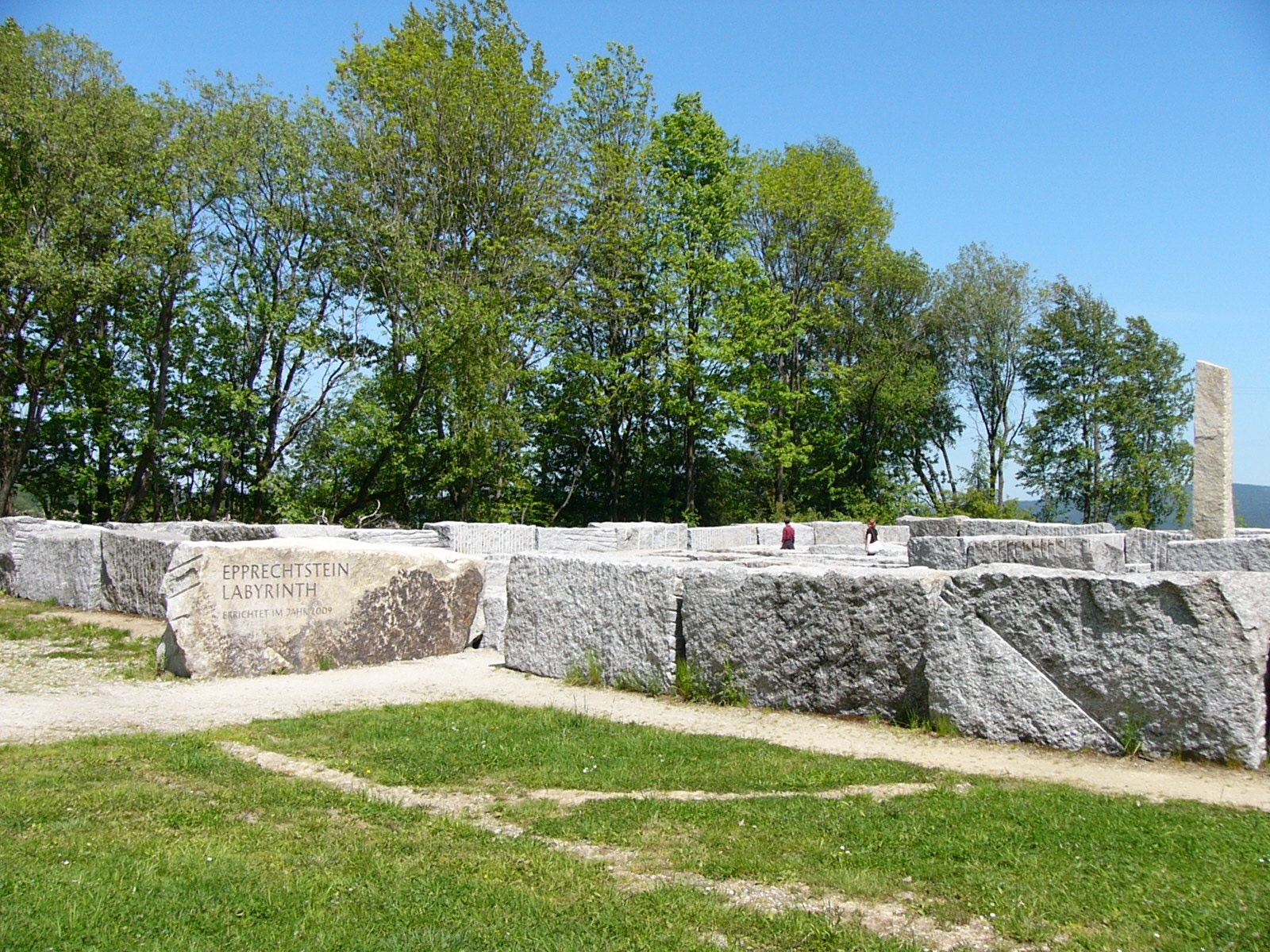 Labyrinth aus Granit am Fuß des Epprechtsteins